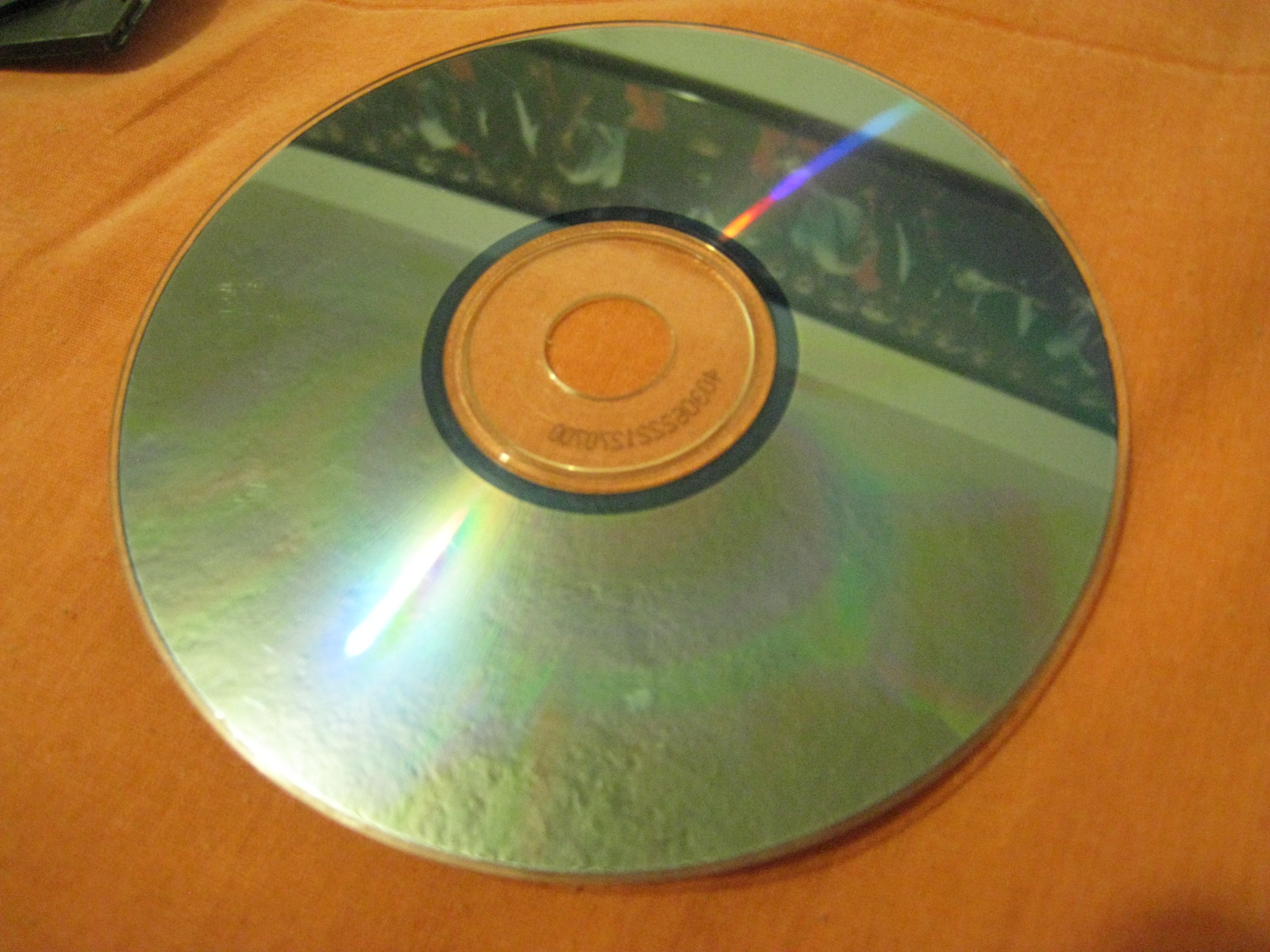 pochette CD.jpg